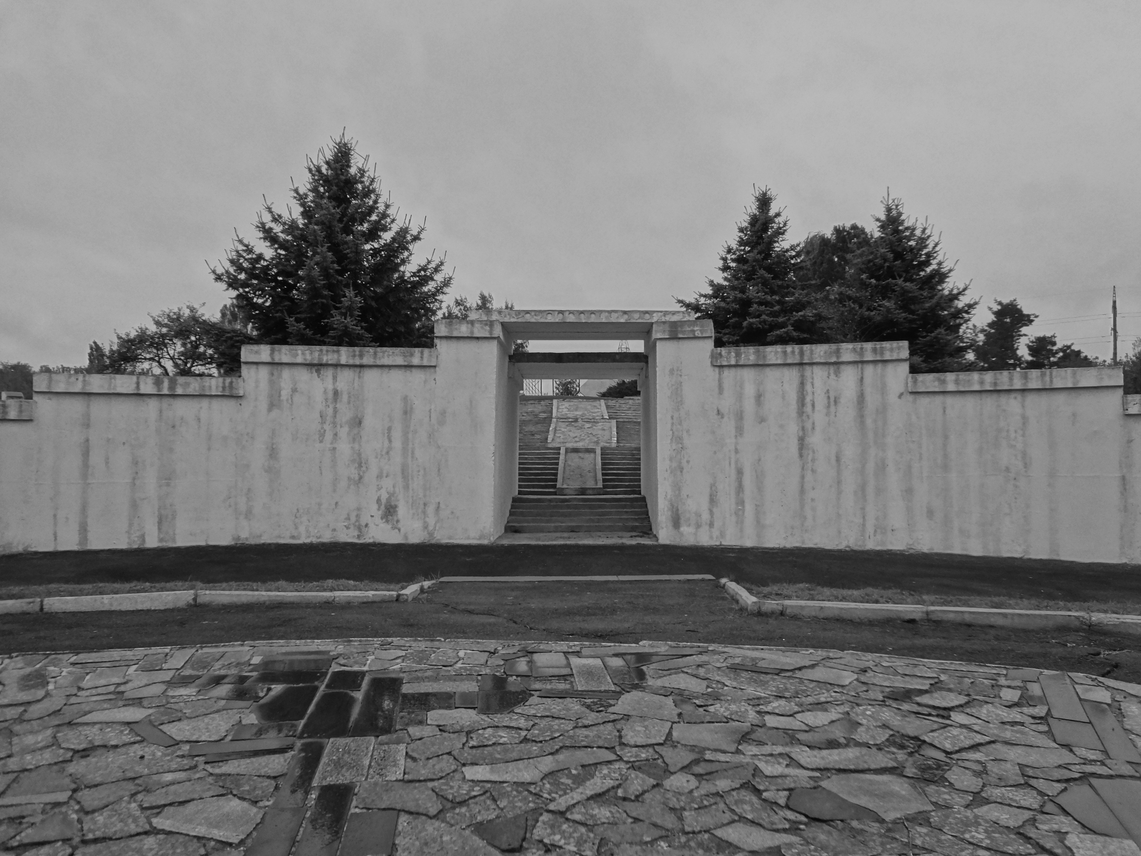 Місце масових розстрілів фашистами радянських громадян, Рівне, вул. Київська, урочище «Сосонки»